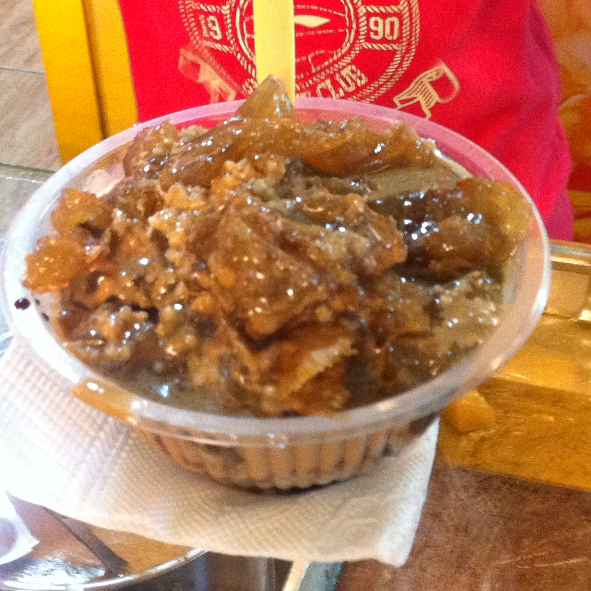 中文（台灣）: 於旅順街頭購得之大連燜子中文（中国大陆）: 在旅顺街头购买的大连焖子